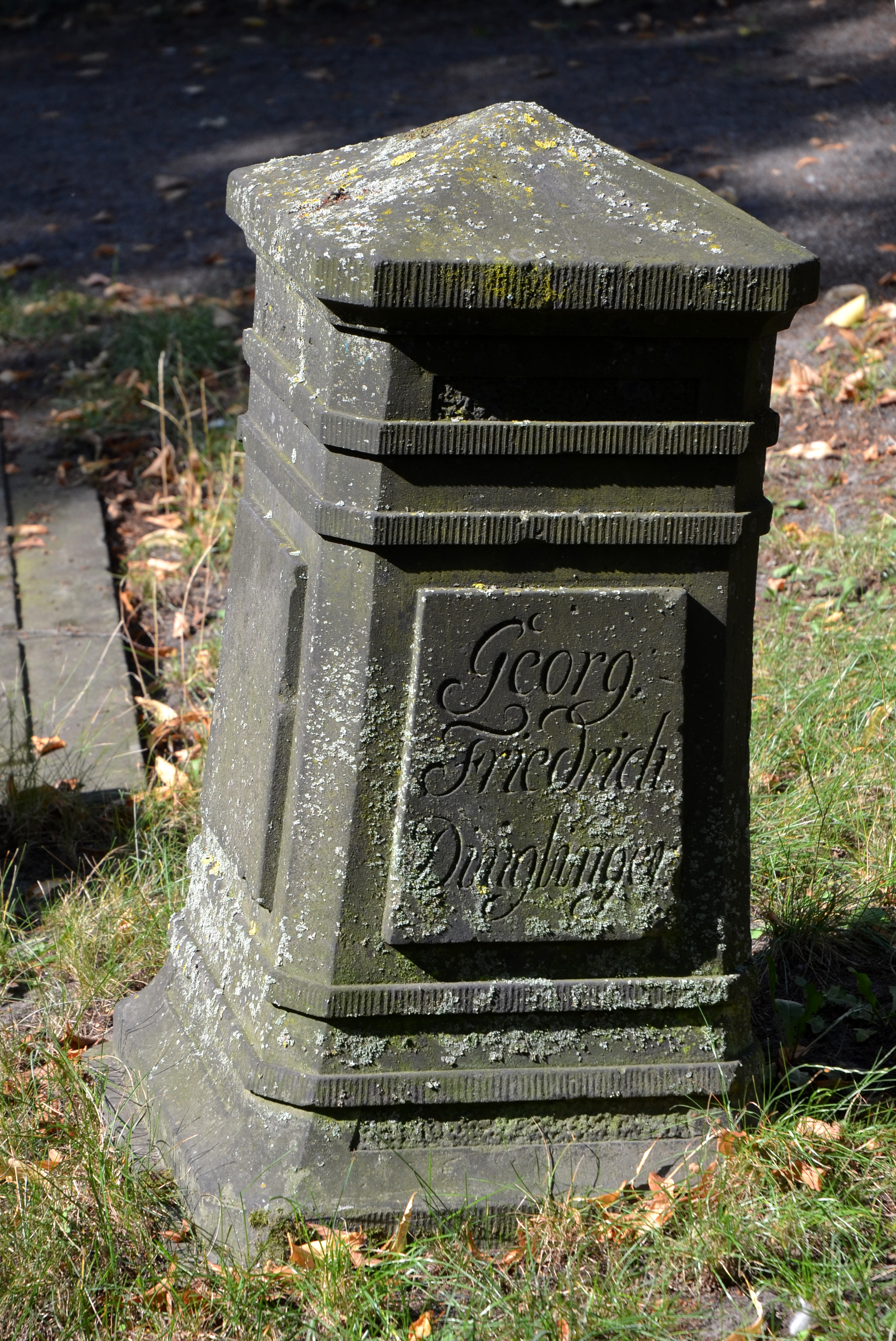 Denkmalgeschützter Grabstein auf dem Gartenfriedhof in Hannover, mit der Inschrift für „Georg Friedrich Dinglinger“ geboren 6. August 1746, gestorben als Kleinkind am 7. April 1749, Sohn des Festungsbaumeisters Georg Friedrich Dinglinger